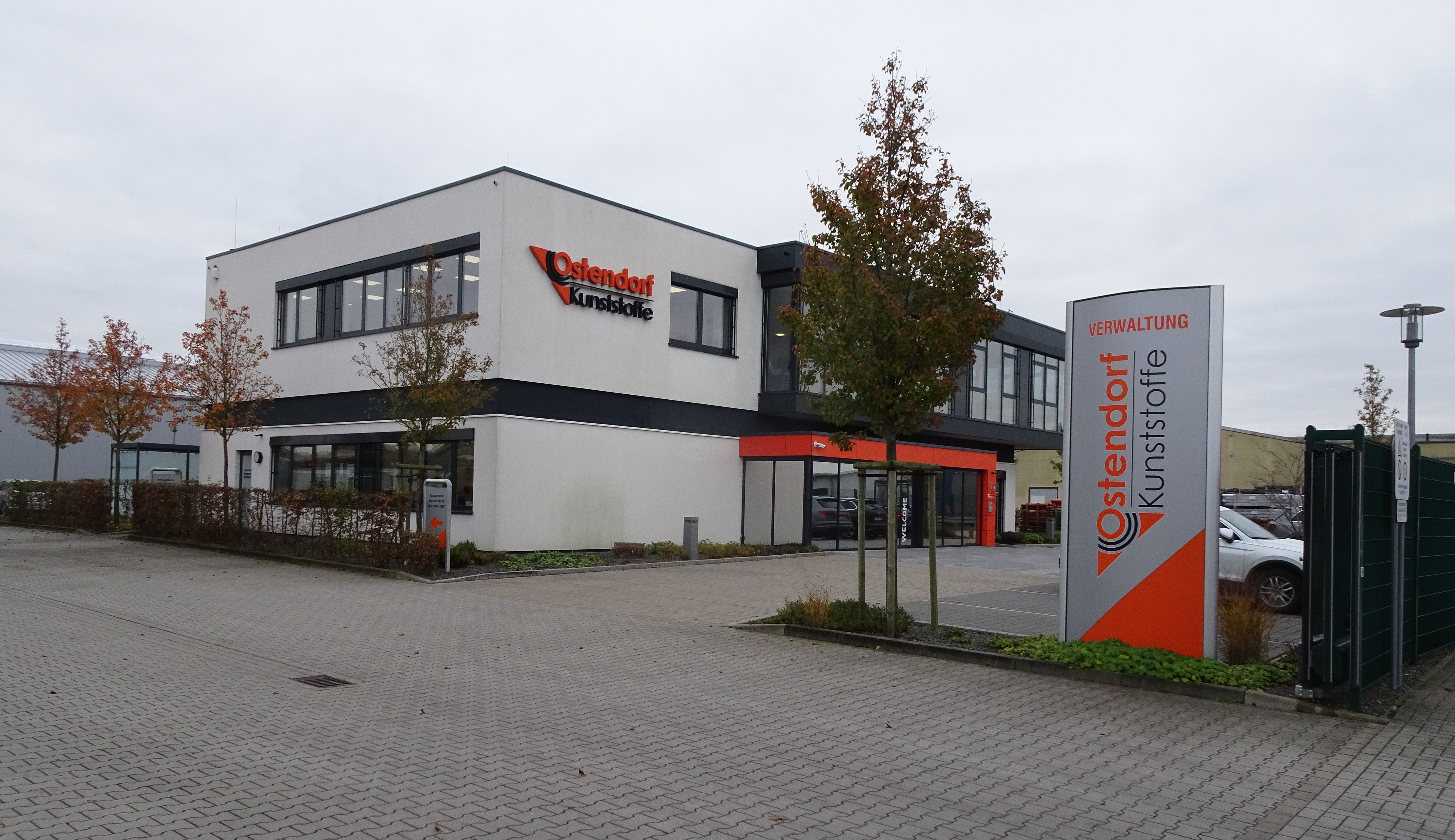 Ostendorf Kunststoffe in Vechta